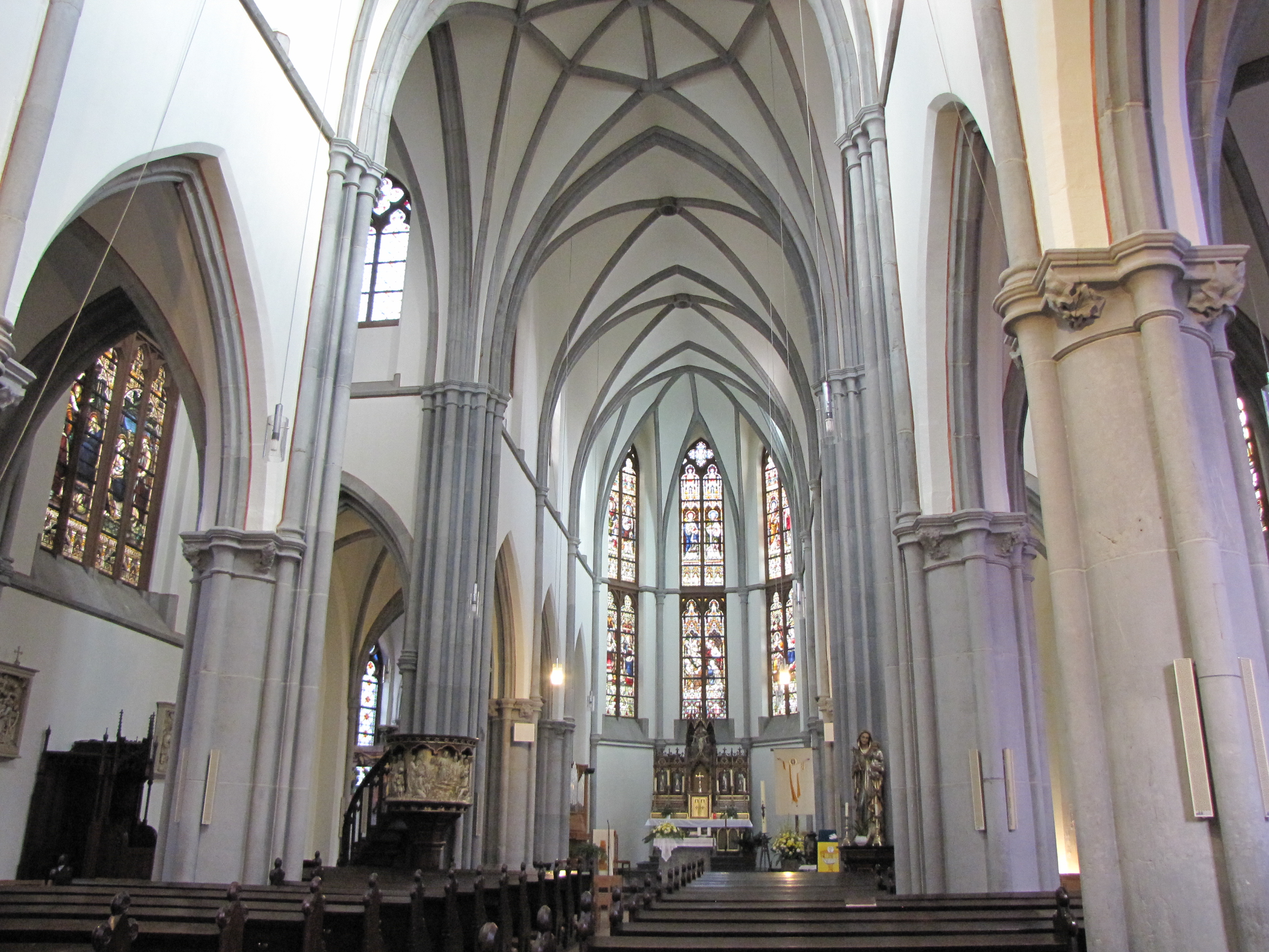 Eglise St Joseph, néogothique, Eupen